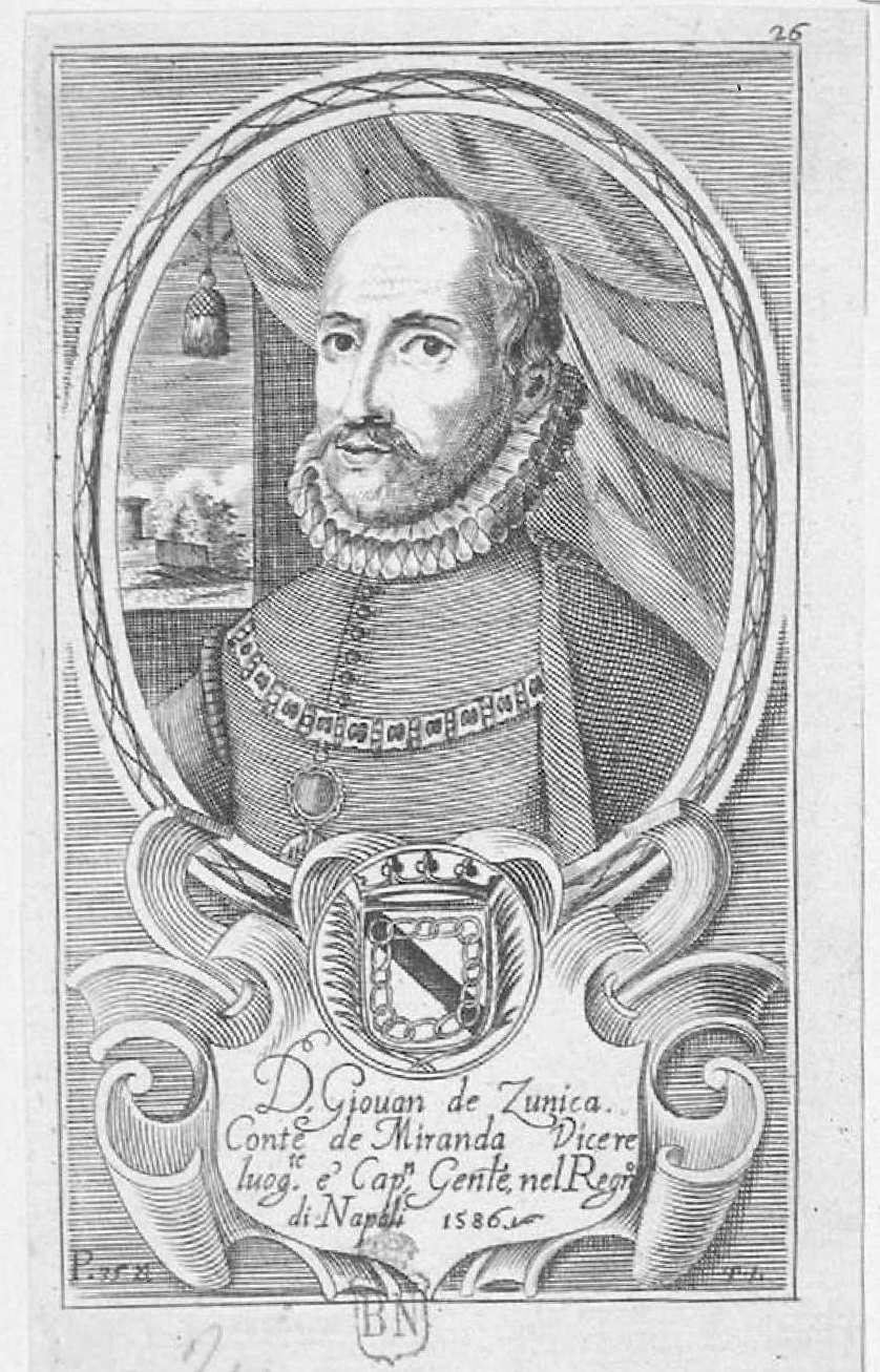 Juan de Zúñiga Avellaneda y Bazán (1551-1608). Grabado calcográfico anónimo recogido en Teatro eroico, e politico de'governi de'Vicere del Regno de Napoli, de Domenico Antonio Parrino, Nápoles, 1692-1695.